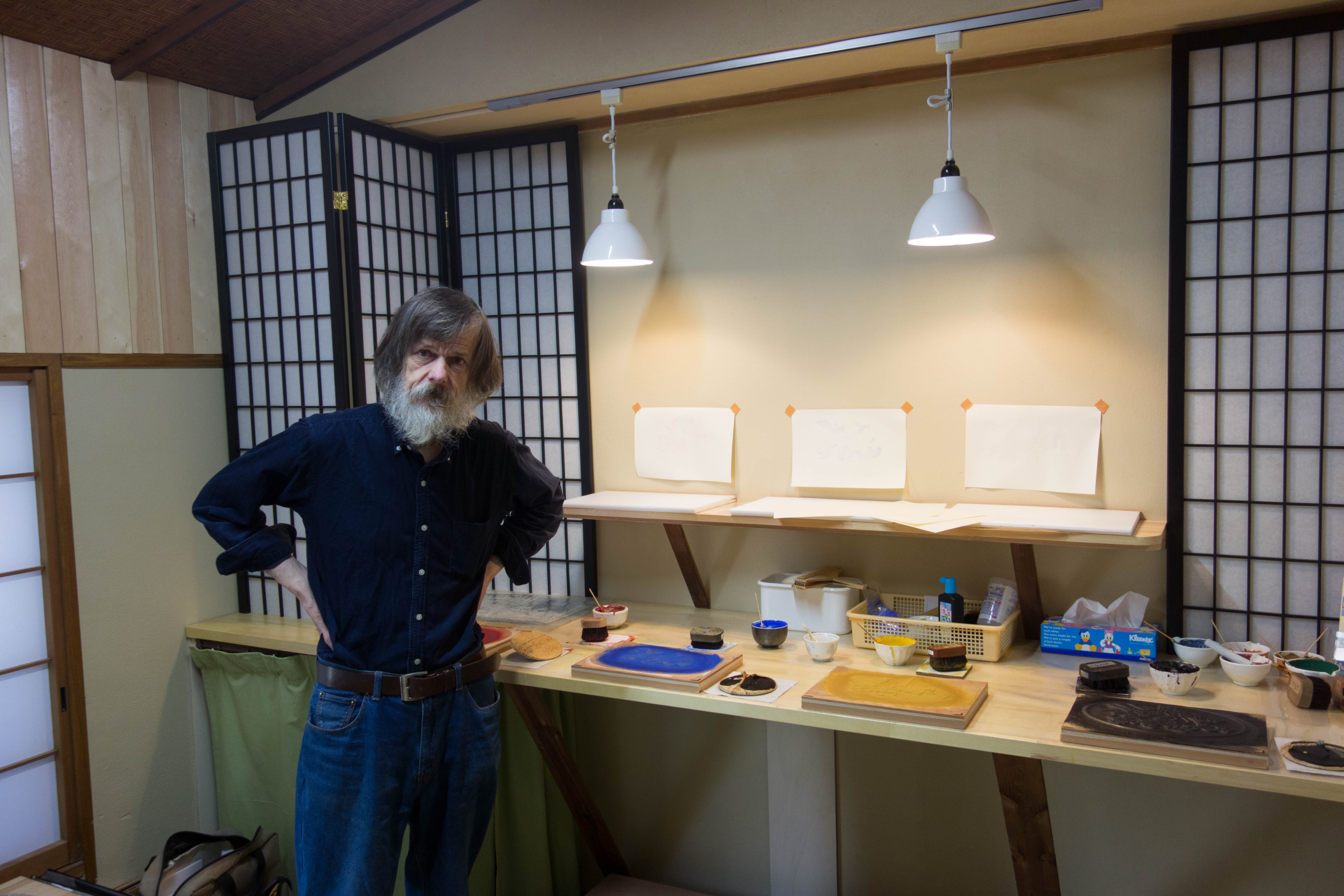 David Bull at his ukiyo-e workshop/studio Mokuhankan, Asakusa.